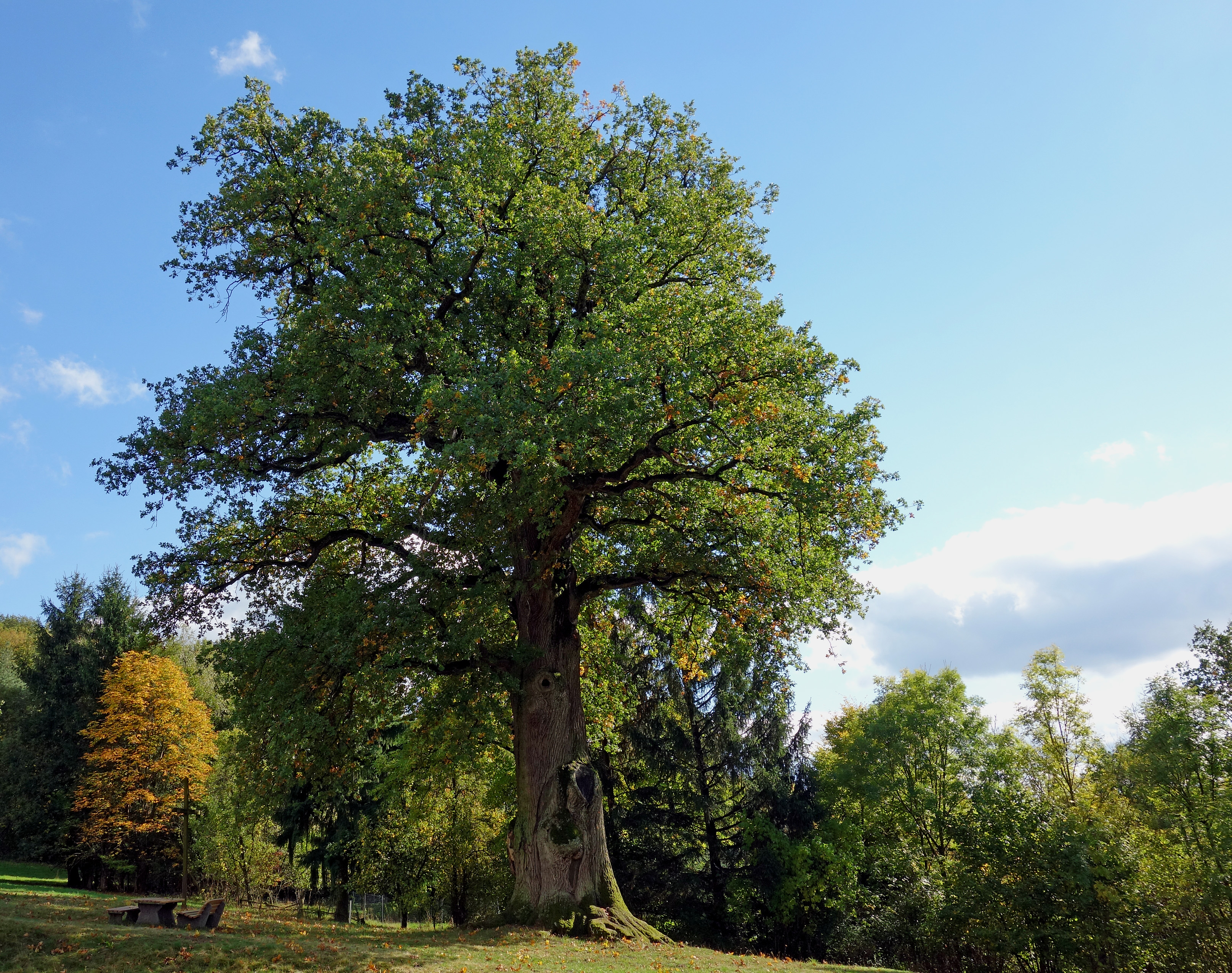 Die Kaisereiche steht auf einer Wiese oberhalb des kleinen Dorfes Füttersee, einem Ortsteil von Geiselwind. Der Sage nach soll Karl der Große bei einer seiner Reisen unter der Eiche geruht haben. Demnach wäre die Eiche über 1.200 Jahre alt. 2013 hat der Brusthöhenumfang 7,95 m betragen, bei einer Höhe von 24 m.